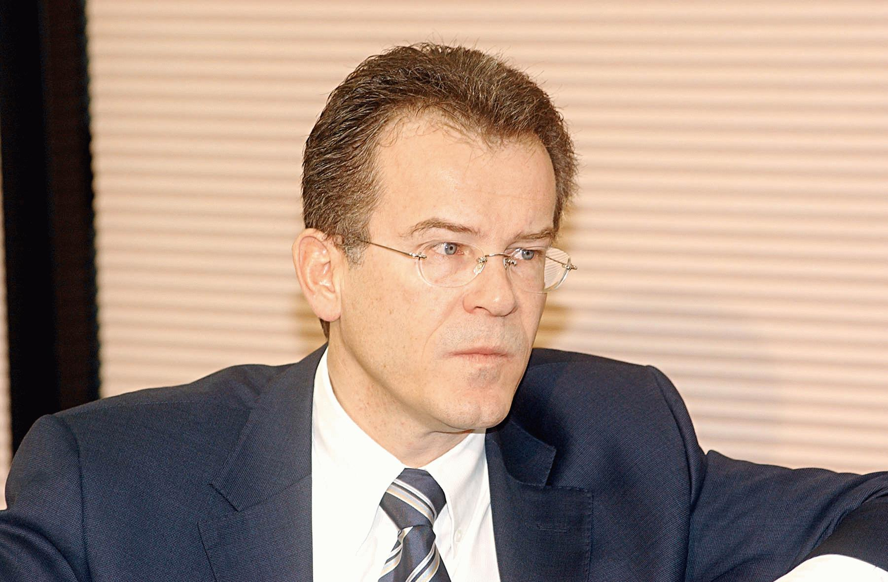 Brasília, 17/2/2003 (Agência Brasil - ABr) - O procurador-geral federal da Suíça, Valentin Roschacher, é recebido na Procuradoria Geral da República, onde discute acordos de cooperação. (Foto: Antonio Cruz/ABr - hor-02)